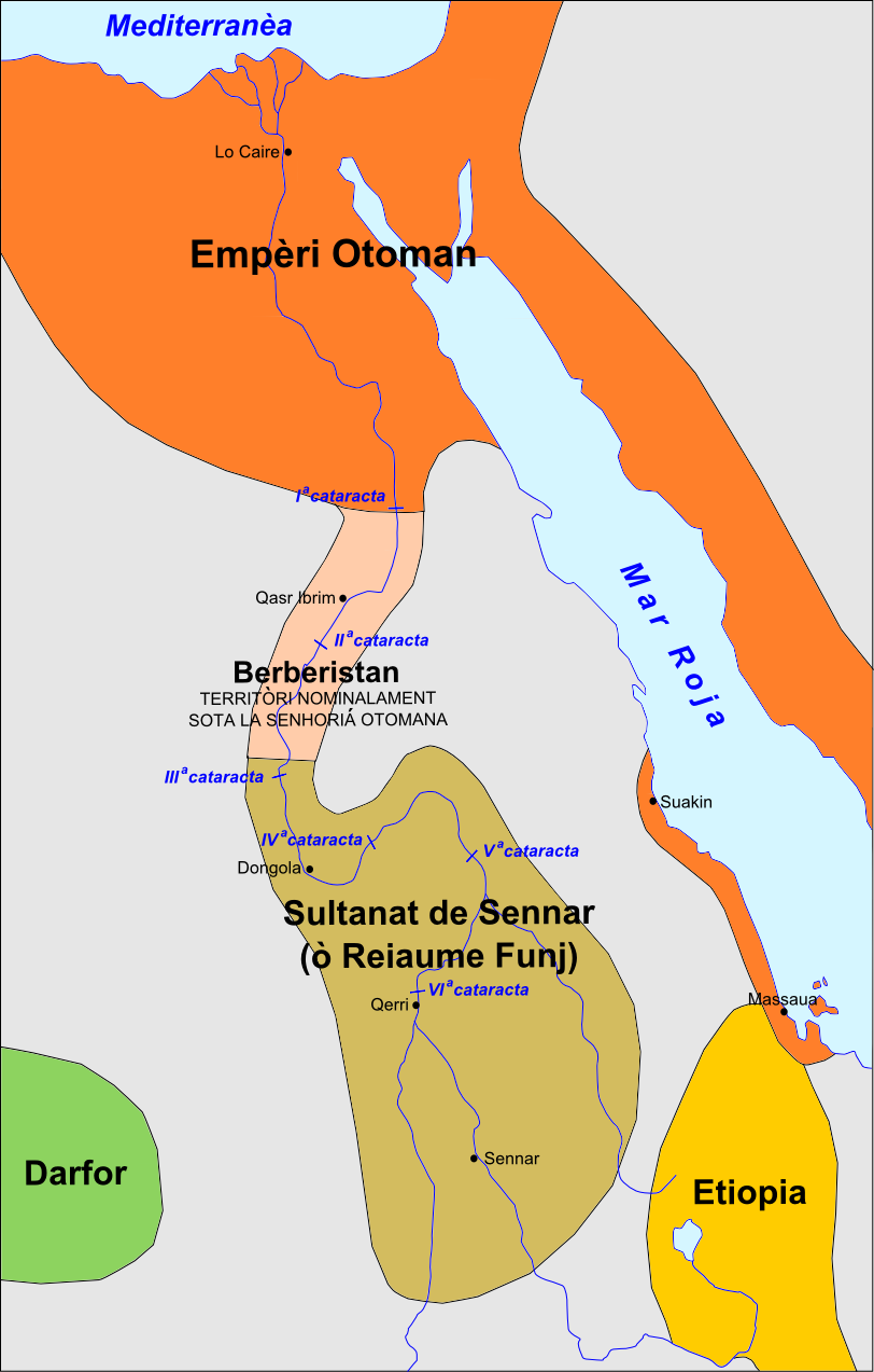 Vau de Nil au començament dau sègle XVIII.